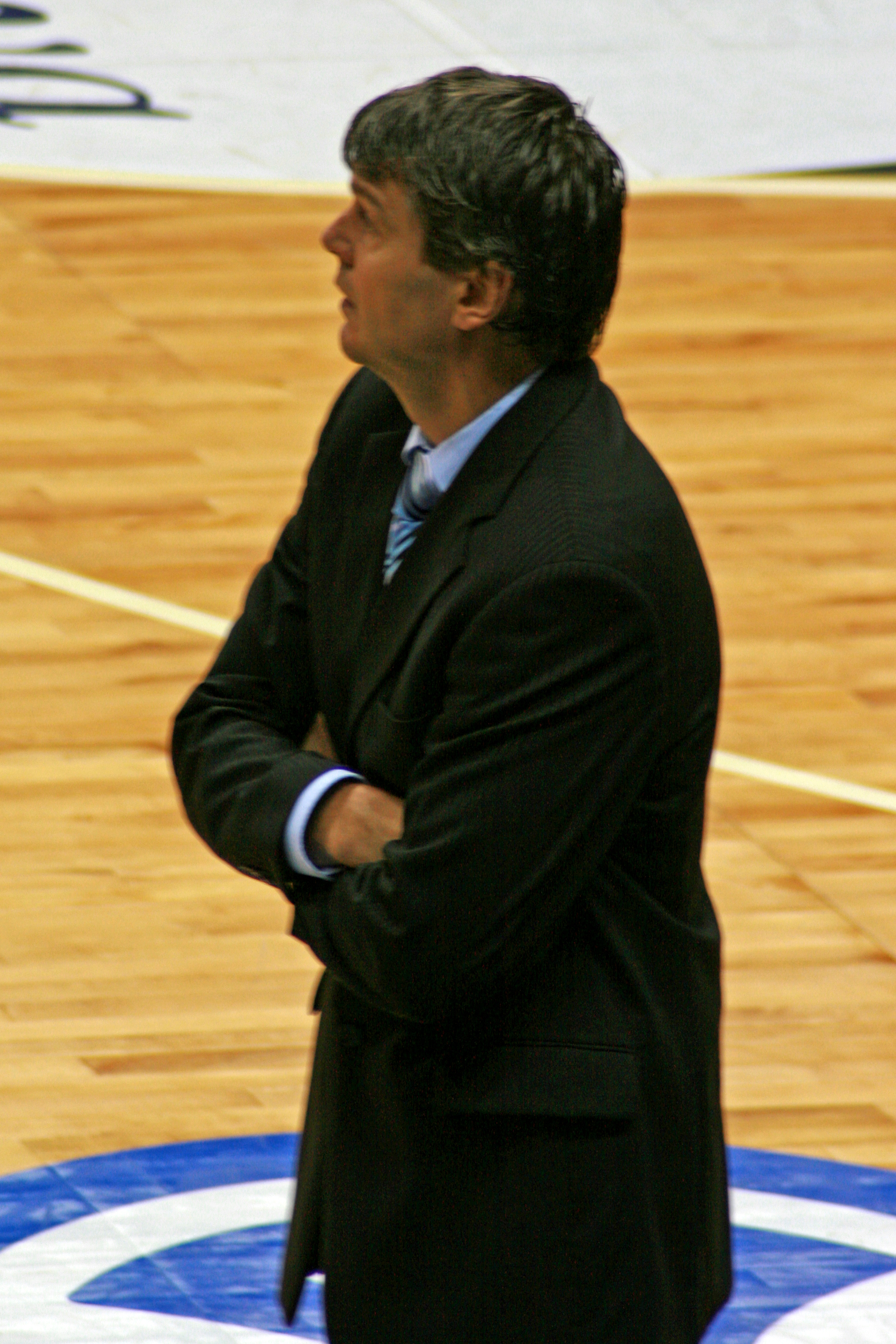 Ainars Bagatskis